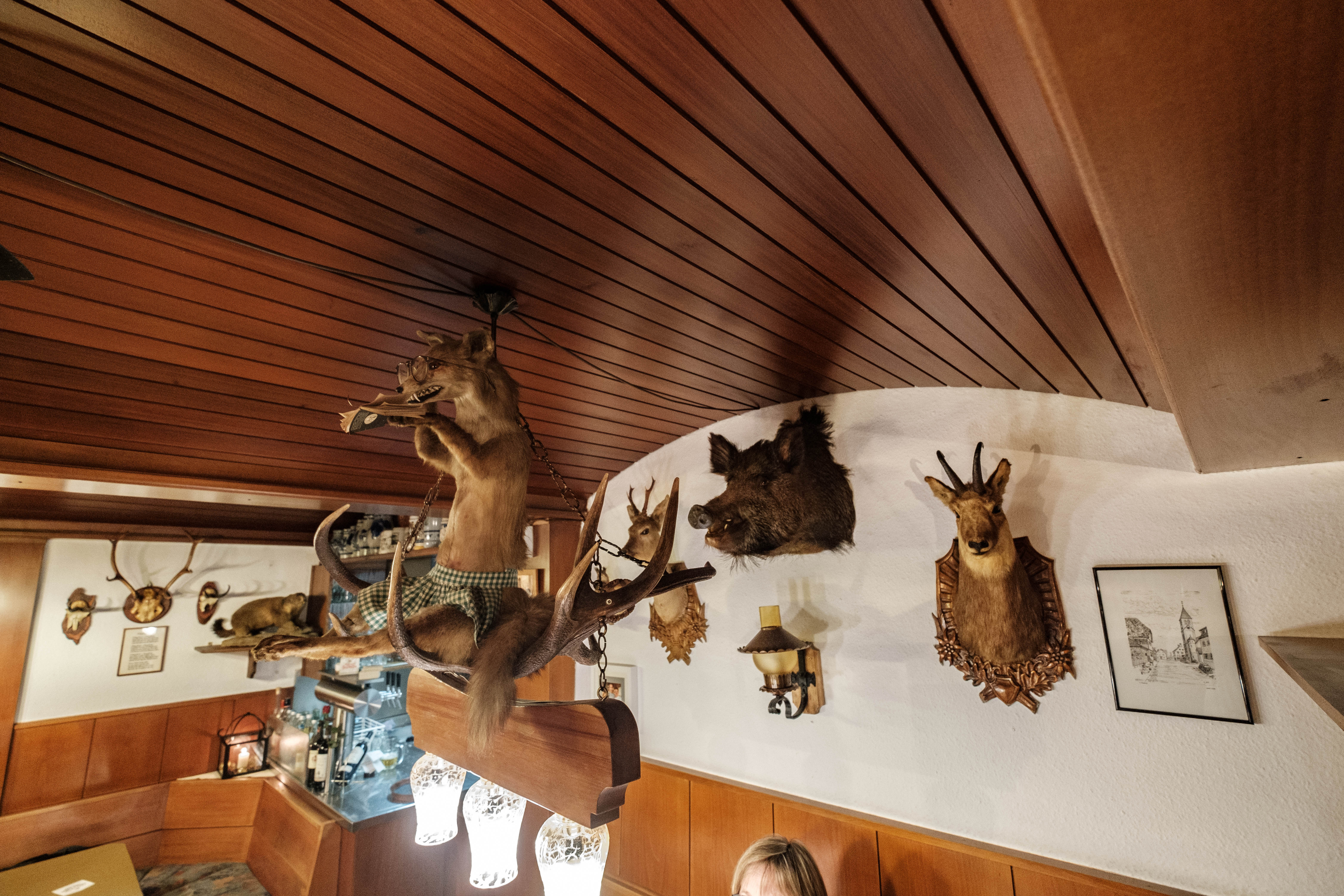 Restaurant Grüner Baum im Stadtteil Hagelloch in Tübingen